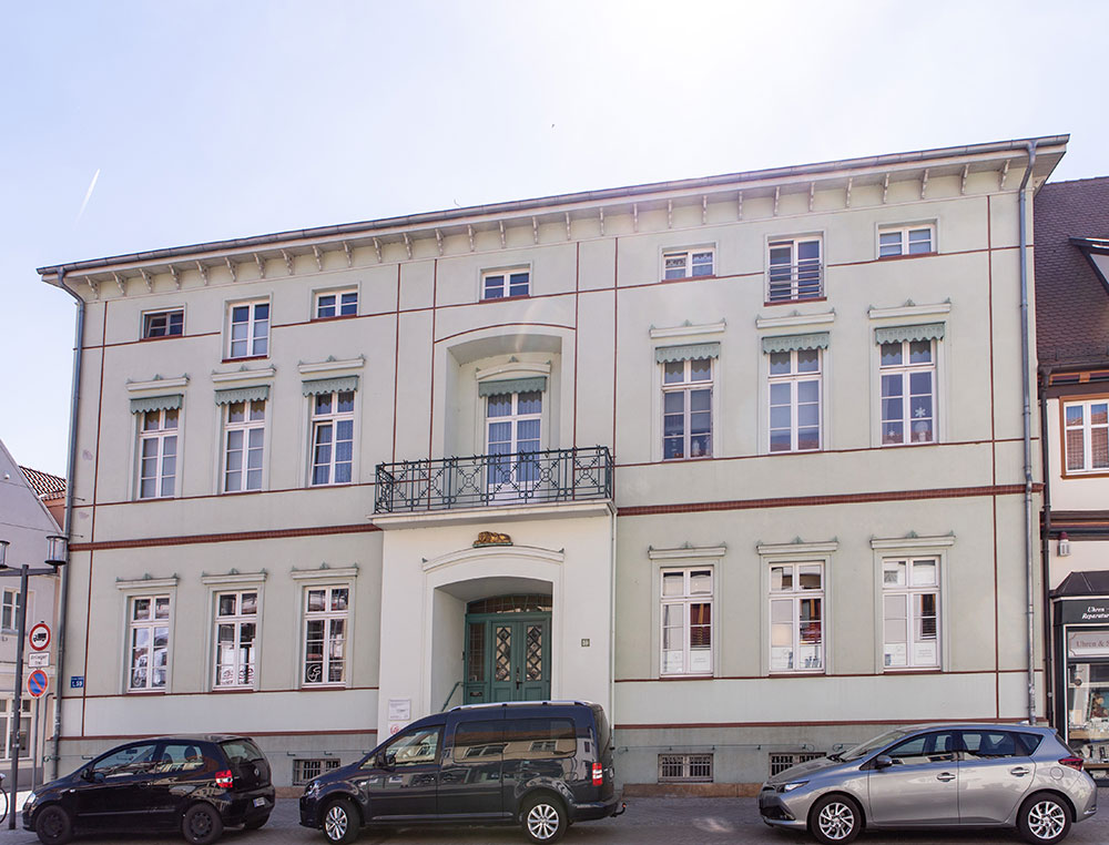 Stendal Breite Straße 59, früheres Gasthaus, Baudenkmal